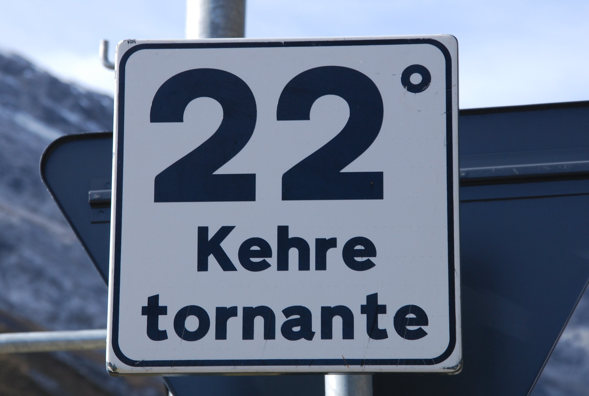 22. Kehre des Stilfser Jochs